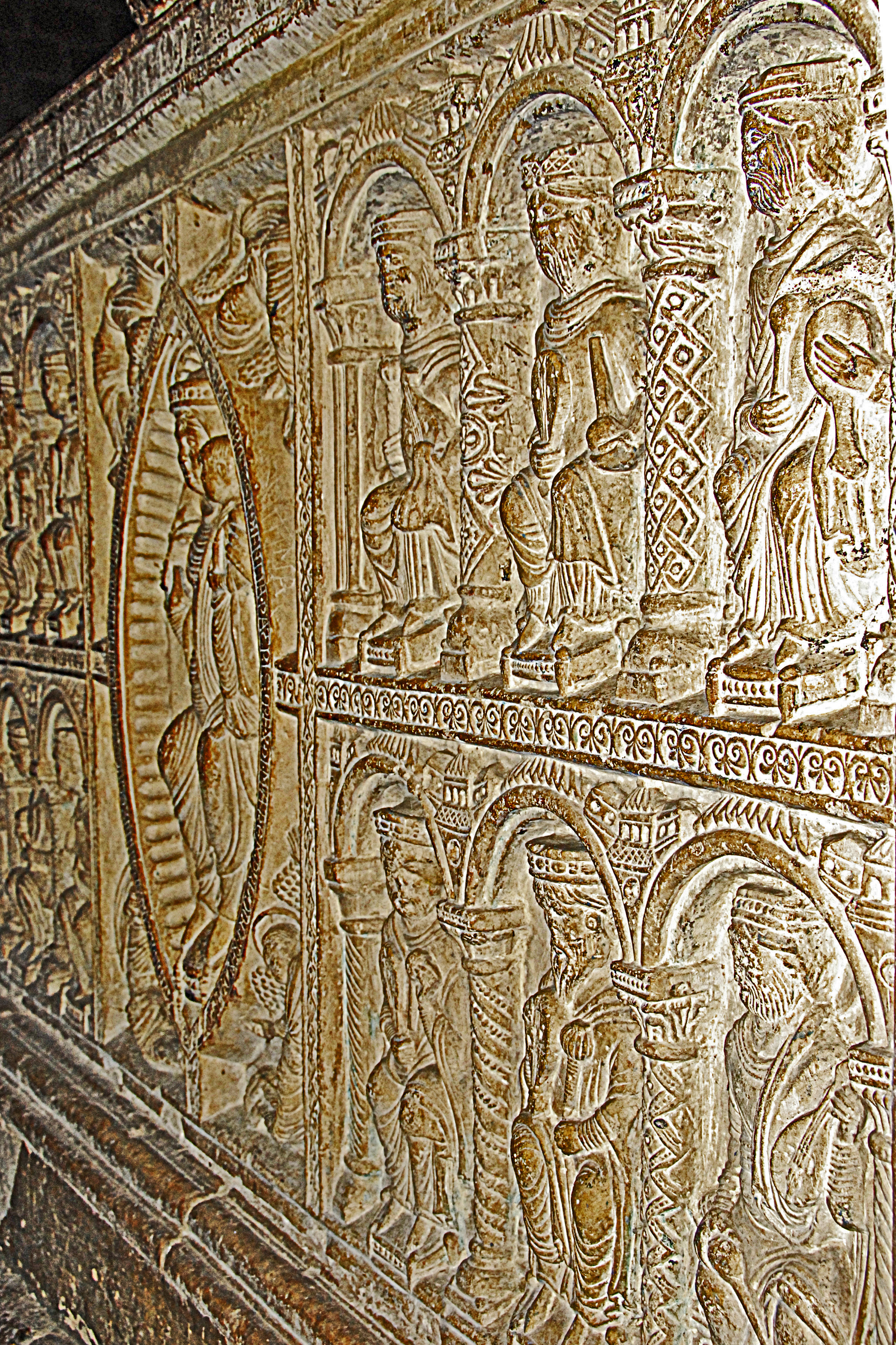 St-Junien, Sarkophag, Nordseite, Relief von NW